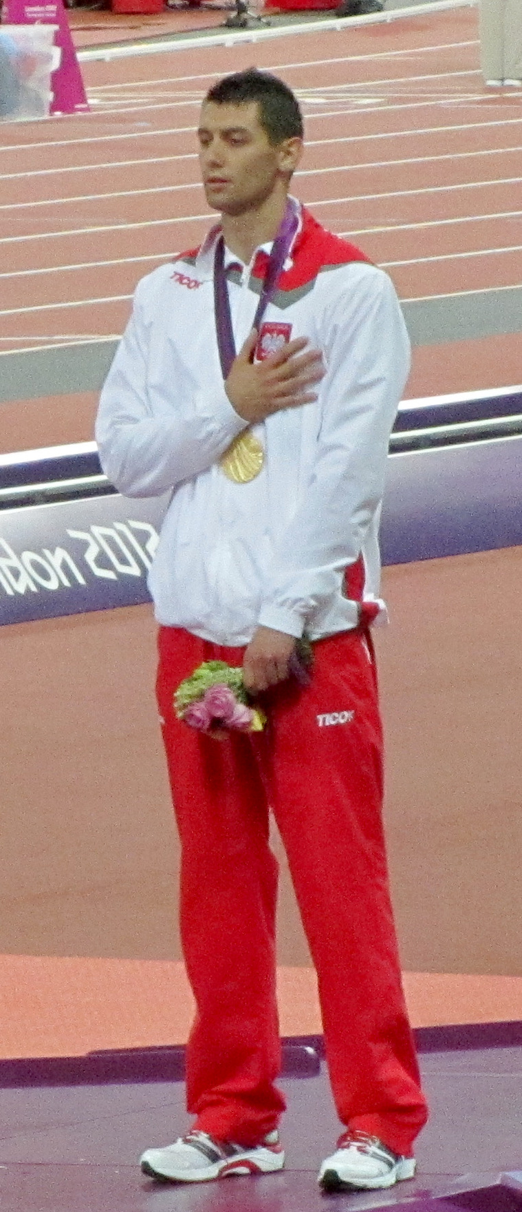 Mateusz Michalski